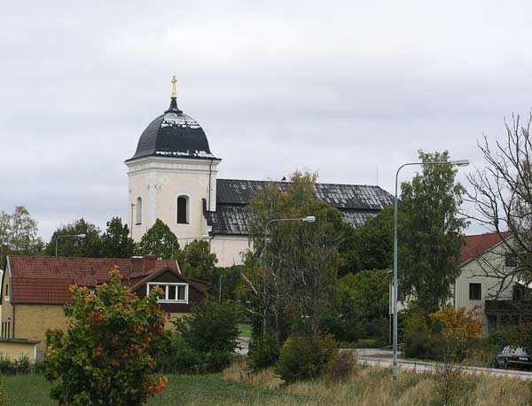 Kimstad kyrka. Foto: Xauxa 2003